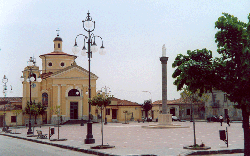 Piazza Real Badia Chiesa della SS:Trinita